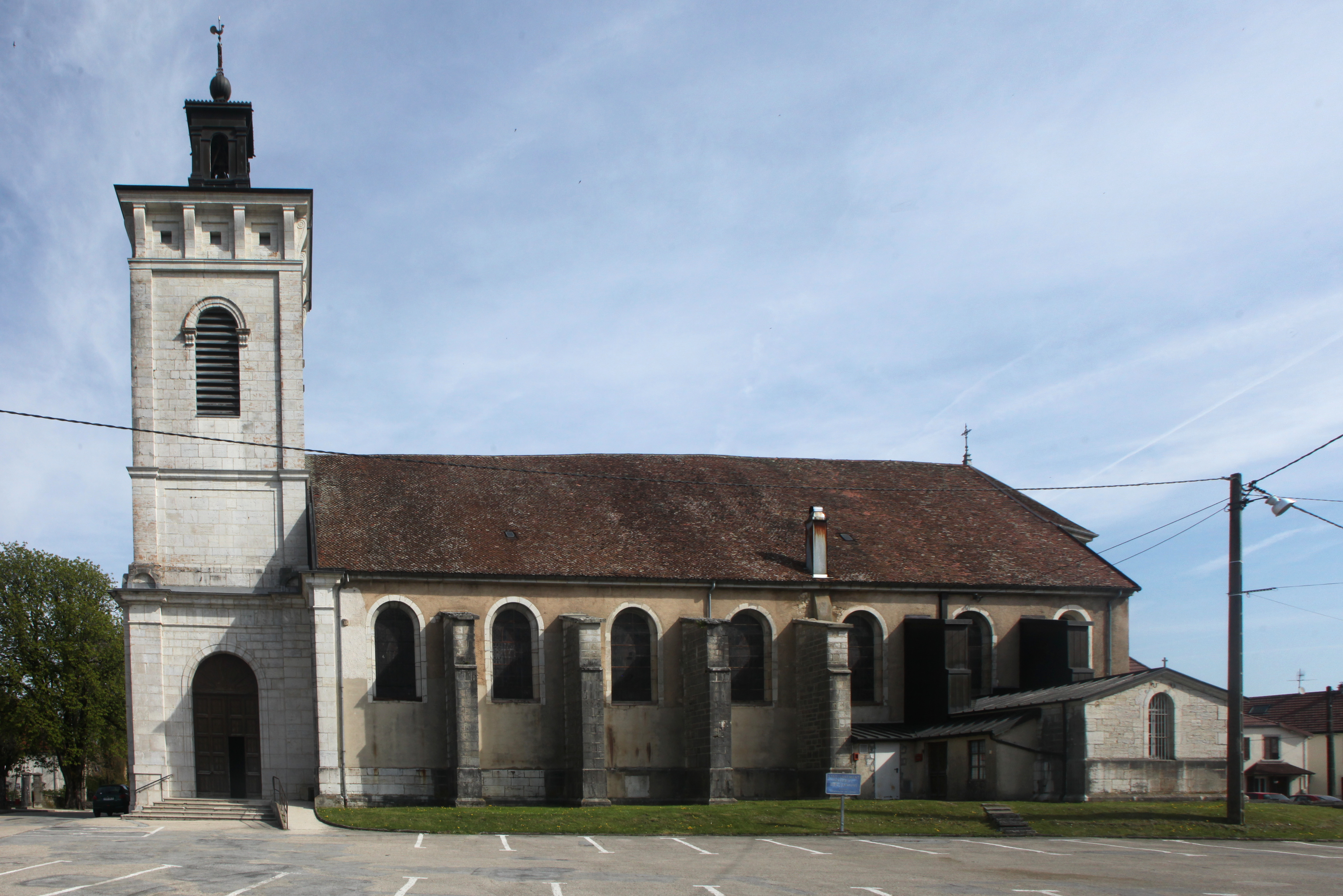 Église de Levier (Doubs).